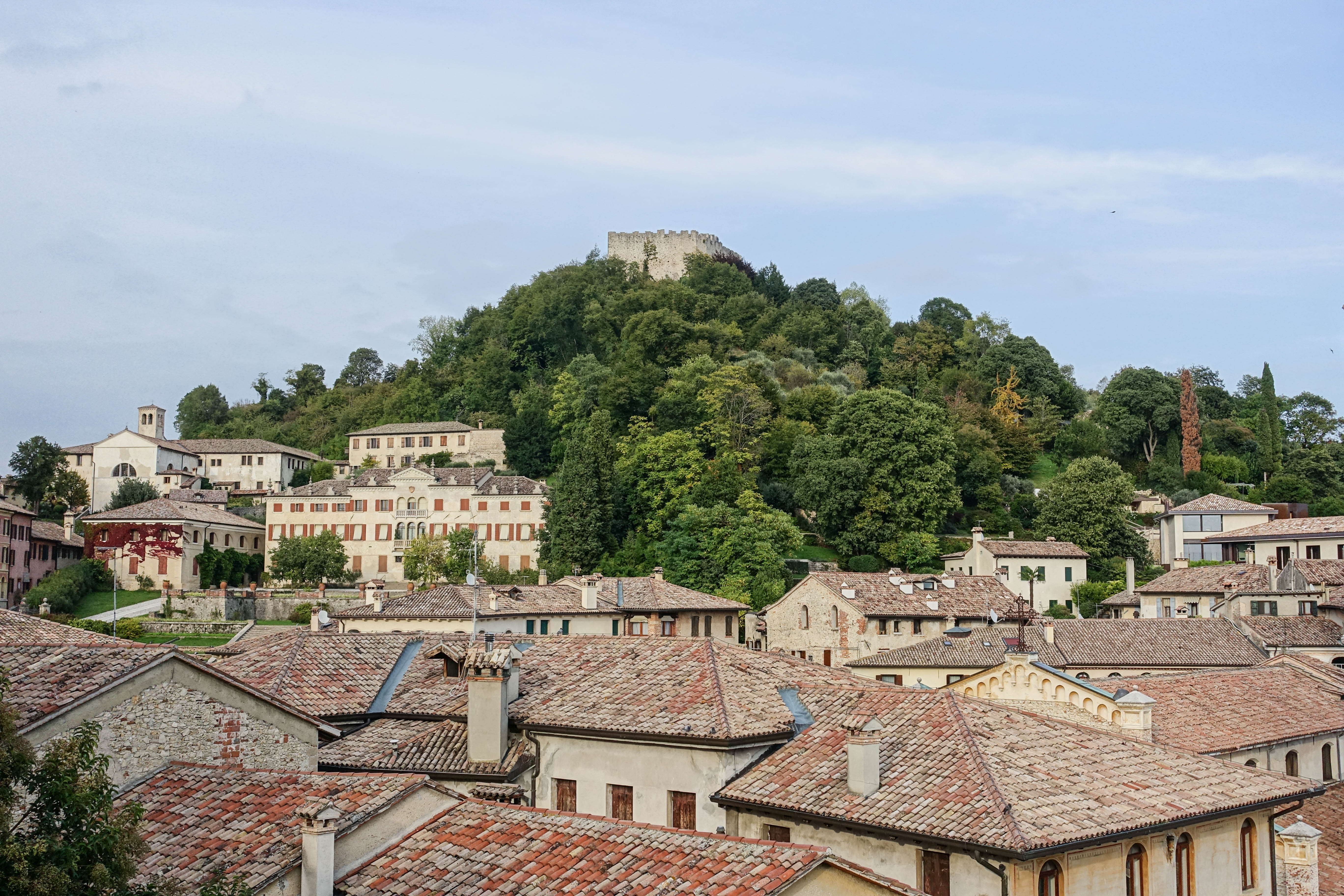 La Rocca sembra una madre che da lontano osserva il Borgo figlio, pronta a difendere in caso di attacco. This is a photo of a monument which is part of cultural heritage of Italy.